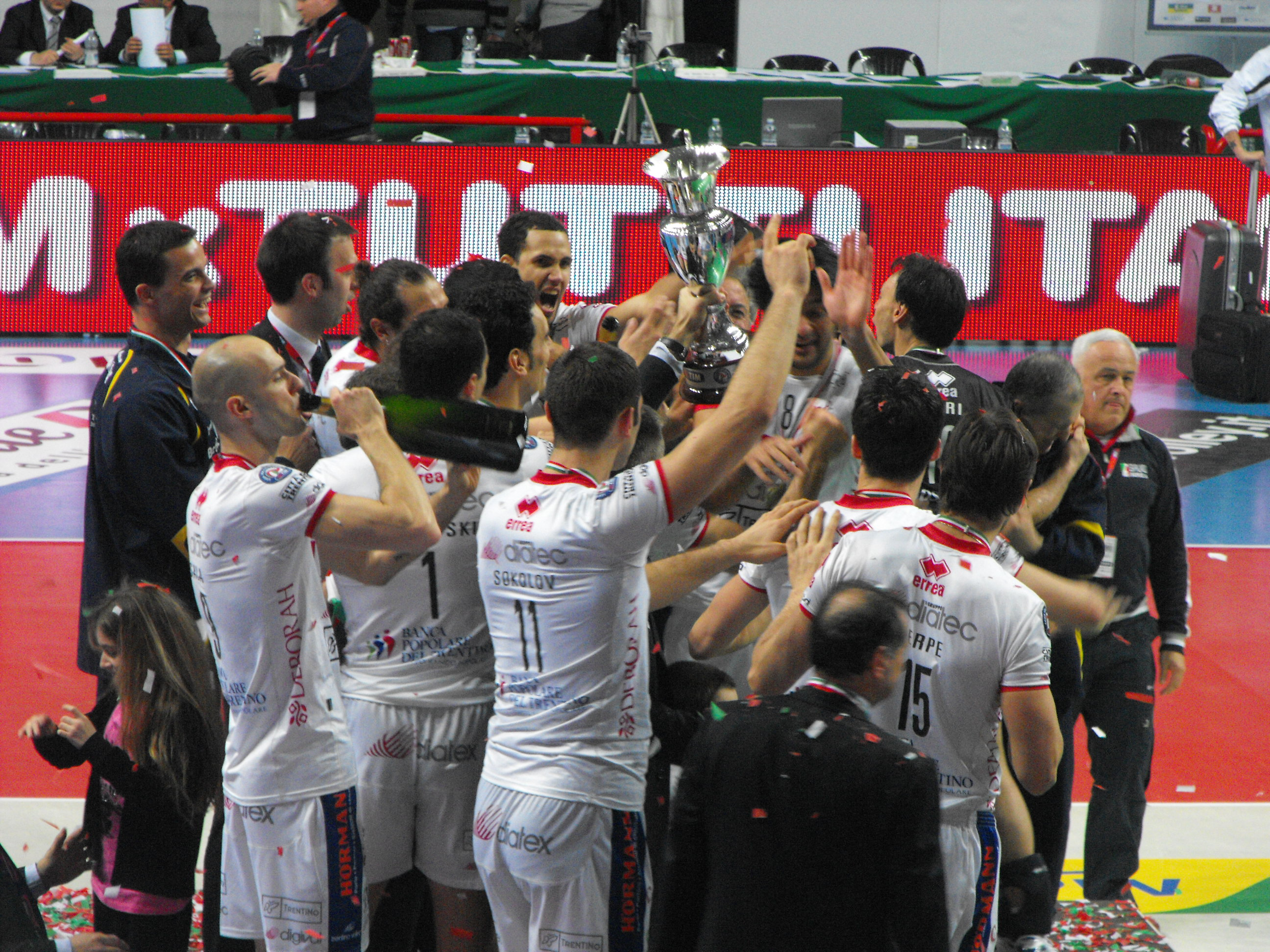 Premiazione della Trentino Volley, vincitrice della Coppa Italia 2010 PalaMadigan, Montecatini Terme (PT)